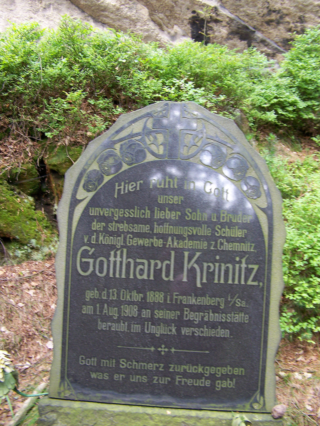 Krinitzgrab am Großen Winterberg (Richterschlüchte, Großer Zschand), Sächsische Schweiz